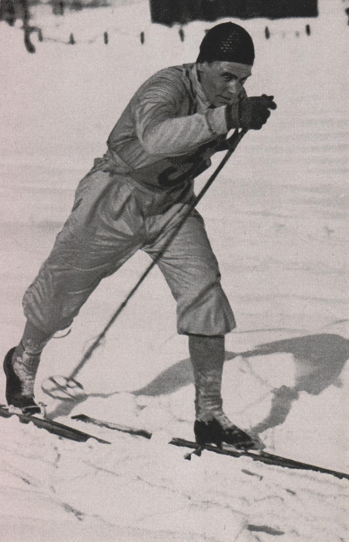 Oddbjørn Hagen durant l'épreuve de fond en 1936 (JO Garmisch)